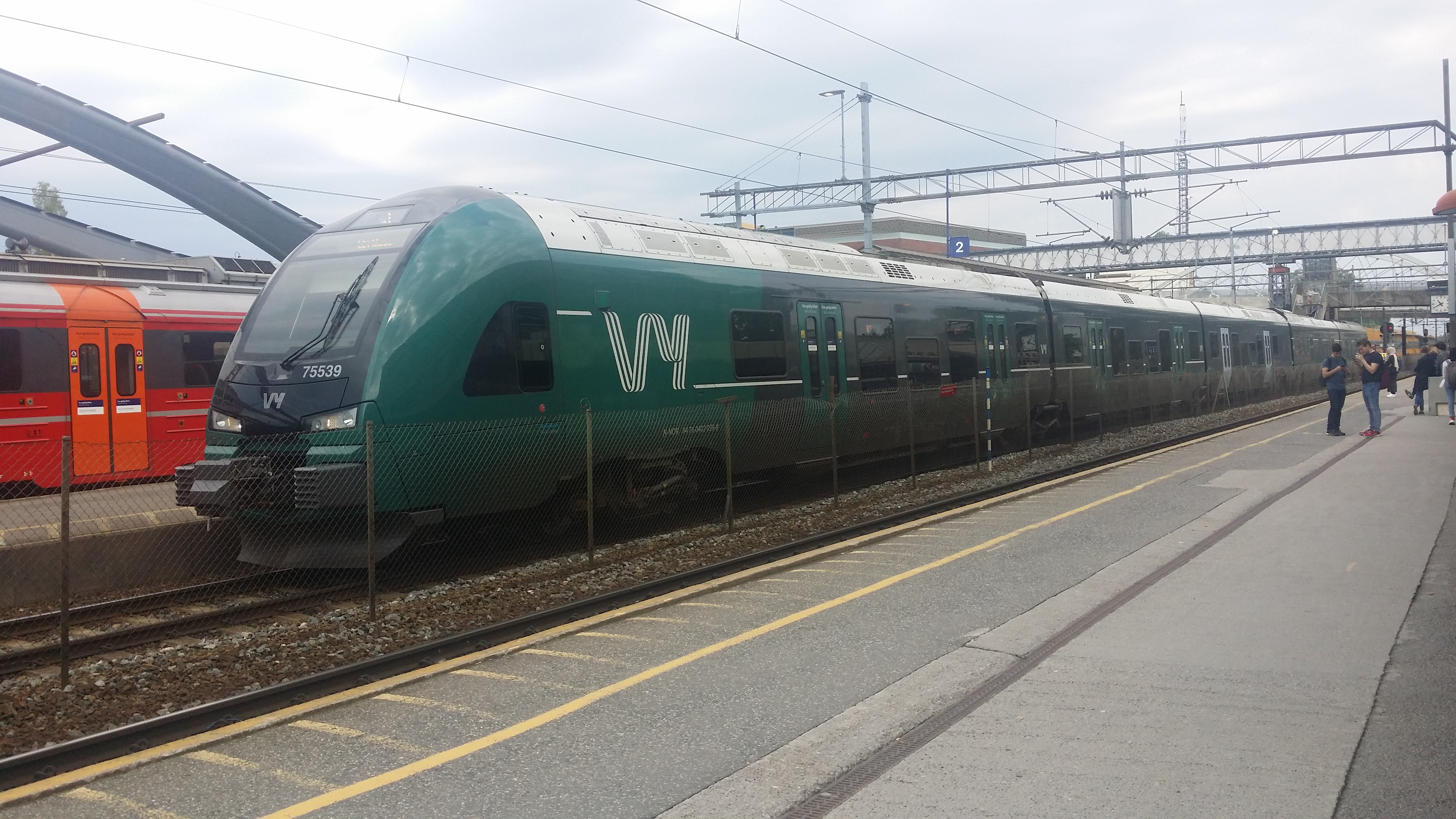 Føste togsett omprofilert til Vy-design